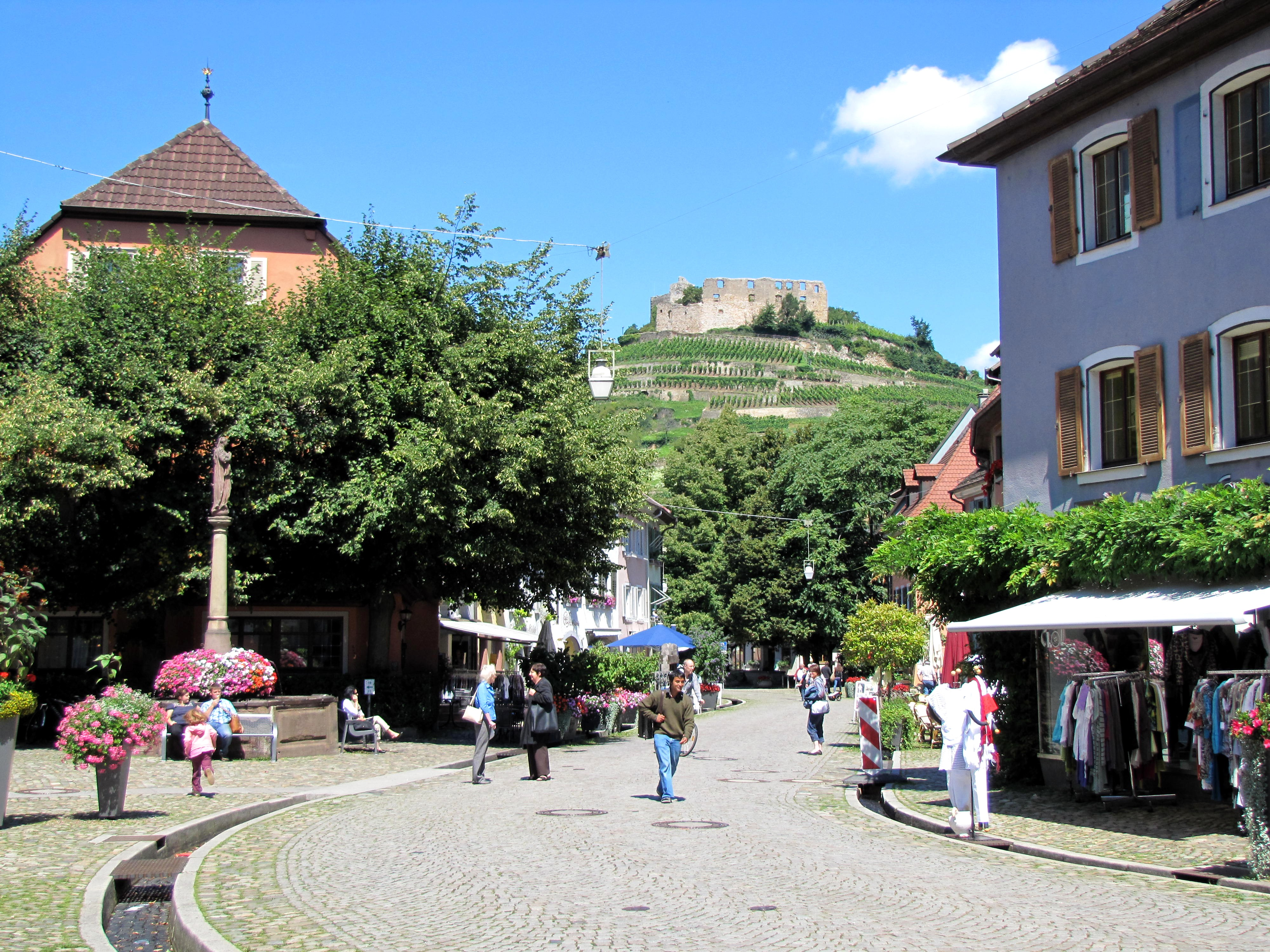 Baden-Württemberg, Staufen im Breisgau